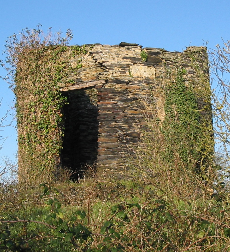 Moulin à vent de la Lande à la Pouëze en Maine et Loire.